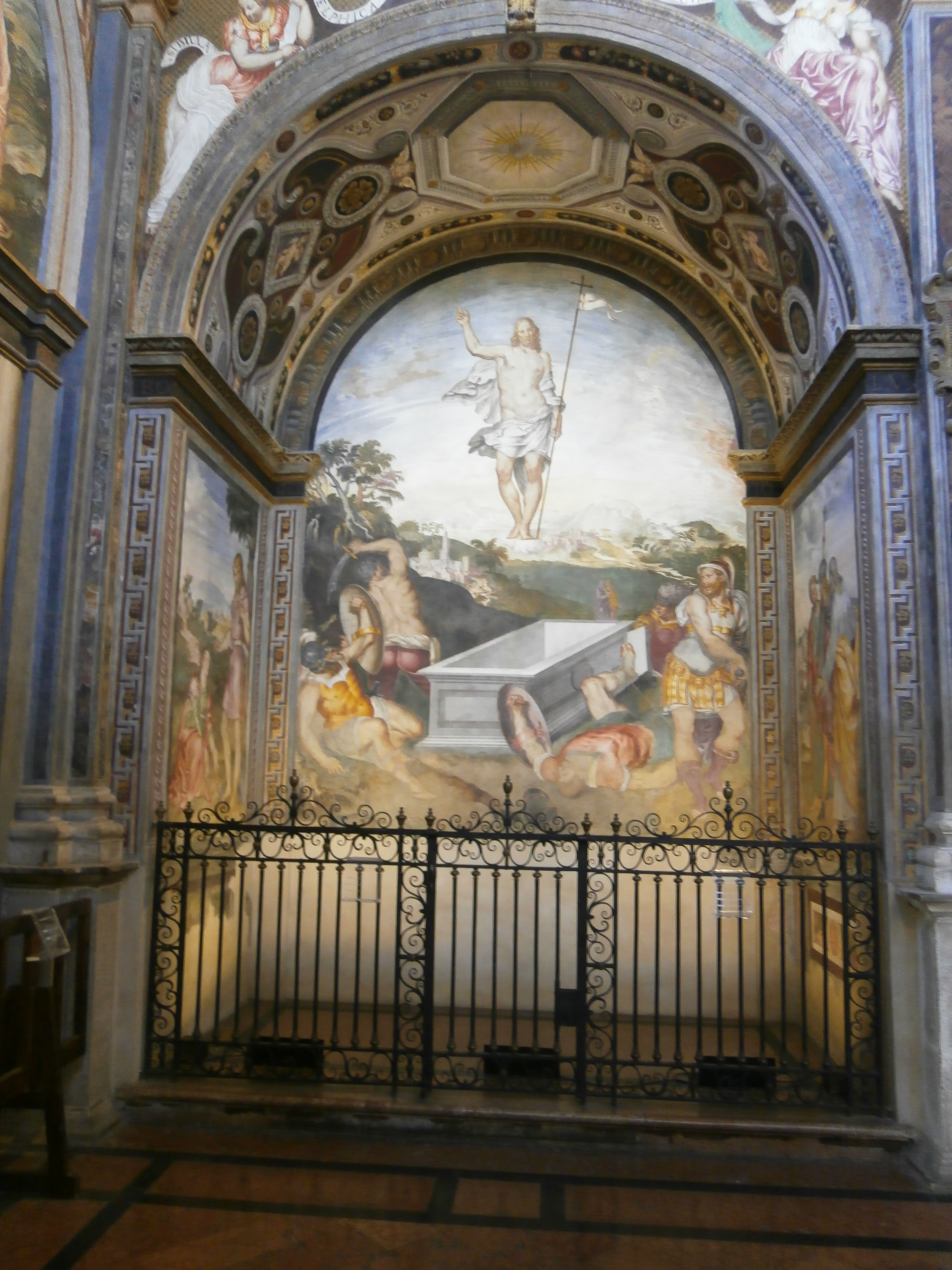 Interno della chiesa di San Maurizio al Monastero Maggiore - Milano - affreschi